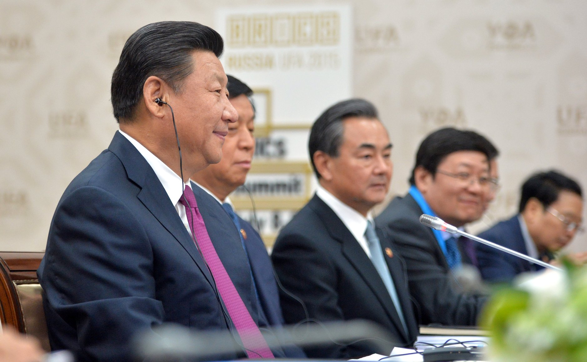 Встреча Президента России Владимира Путина с Председателем КНР Си Цзиньпином